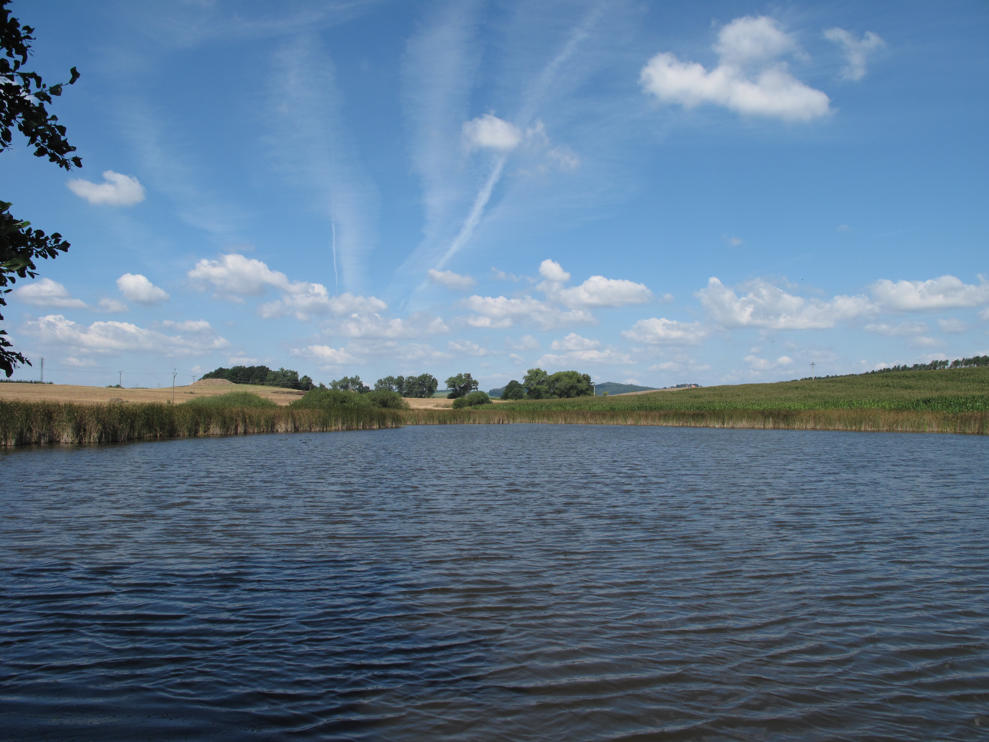 Zálesný rybník. Okres Písek, Česká republika.